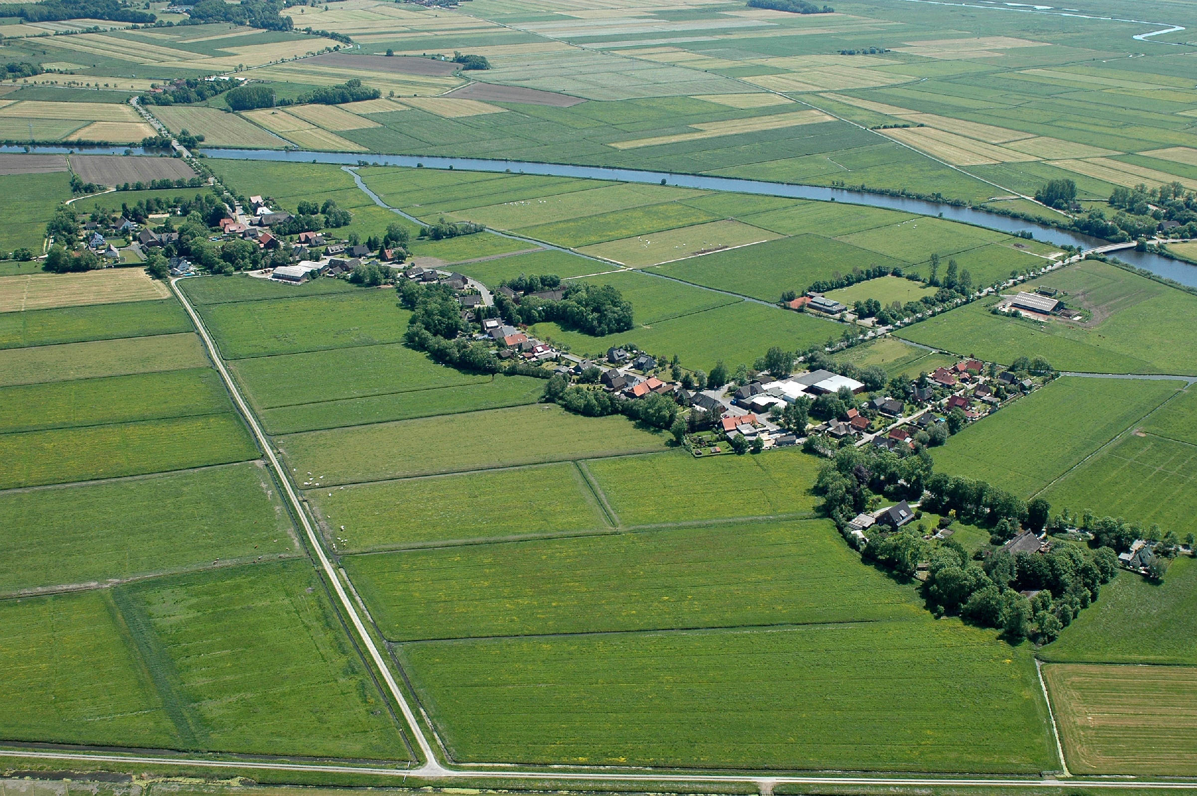 Büttel bei Loxstedt Fotoflug vom Flugplatz Nordholz-Spieka über Cuxhaven und Wilhelmshaven